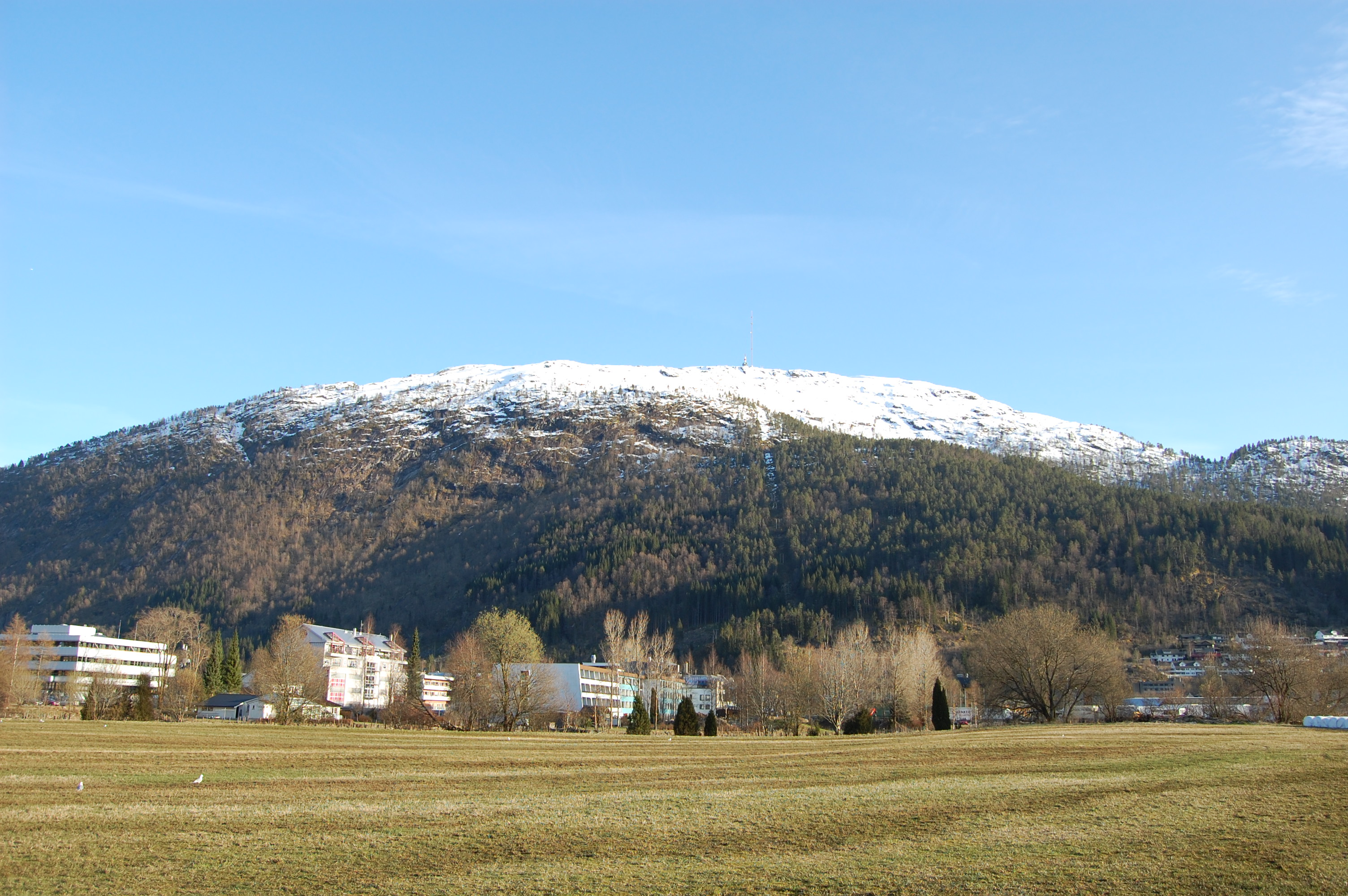 Hafstadfjellet i Førde, Sogn og Fjordane.